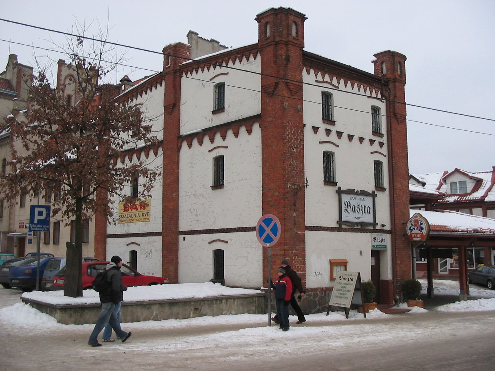 Pisz, ul. Ratuszowa 14 - restauracja "Baszta".